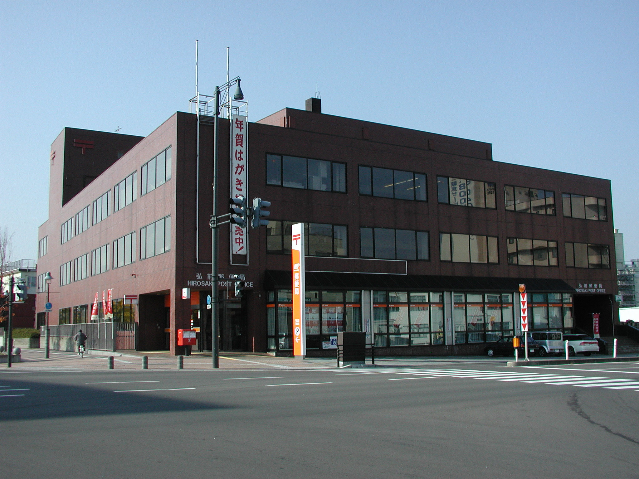 弘前郵便局 郵便事業弘前支店併設